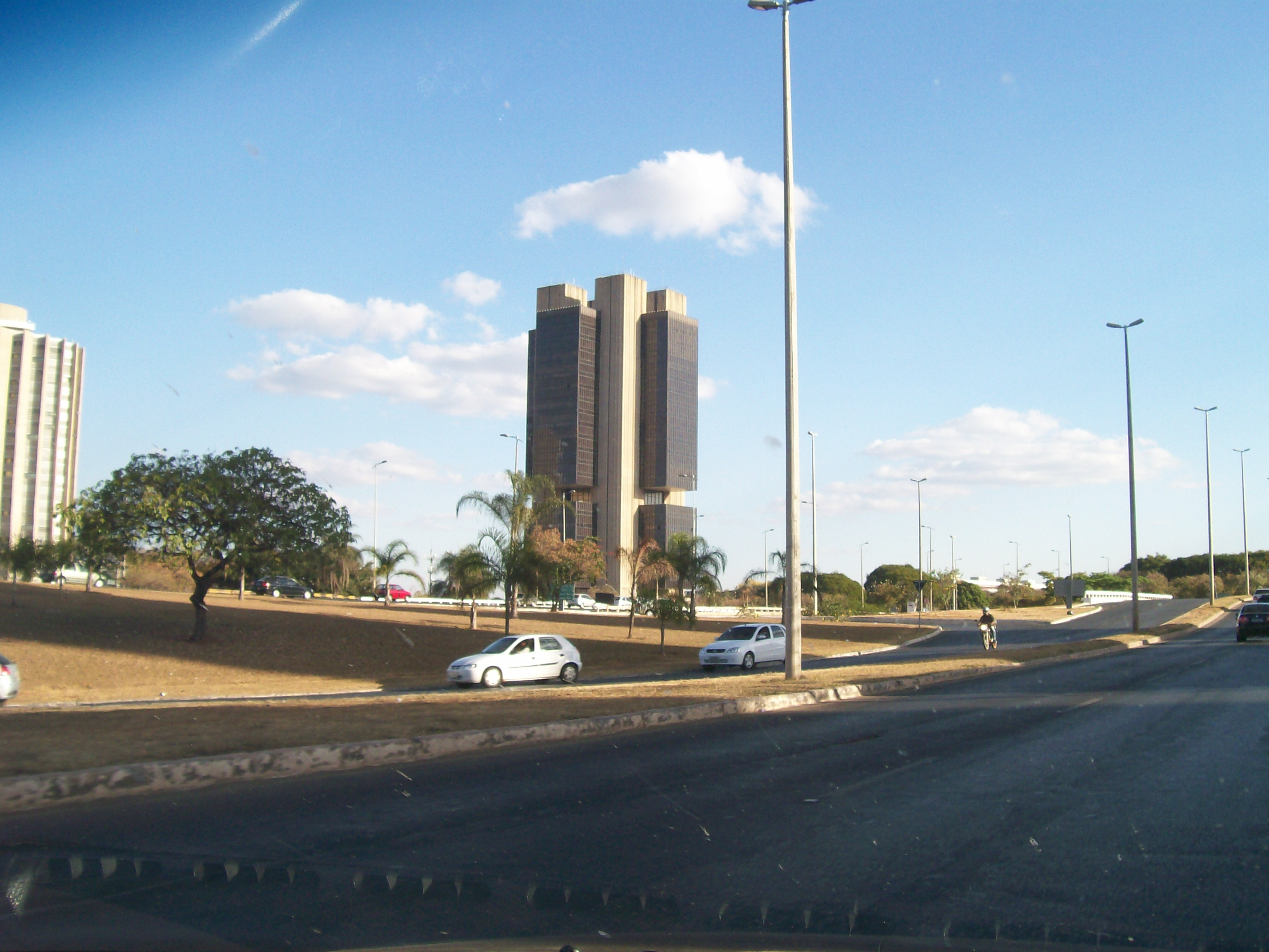 Banco Central do Brasil